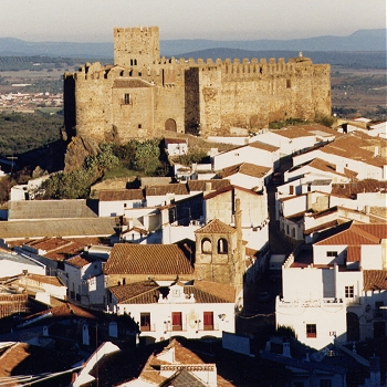 Castillo de Segura de Leon